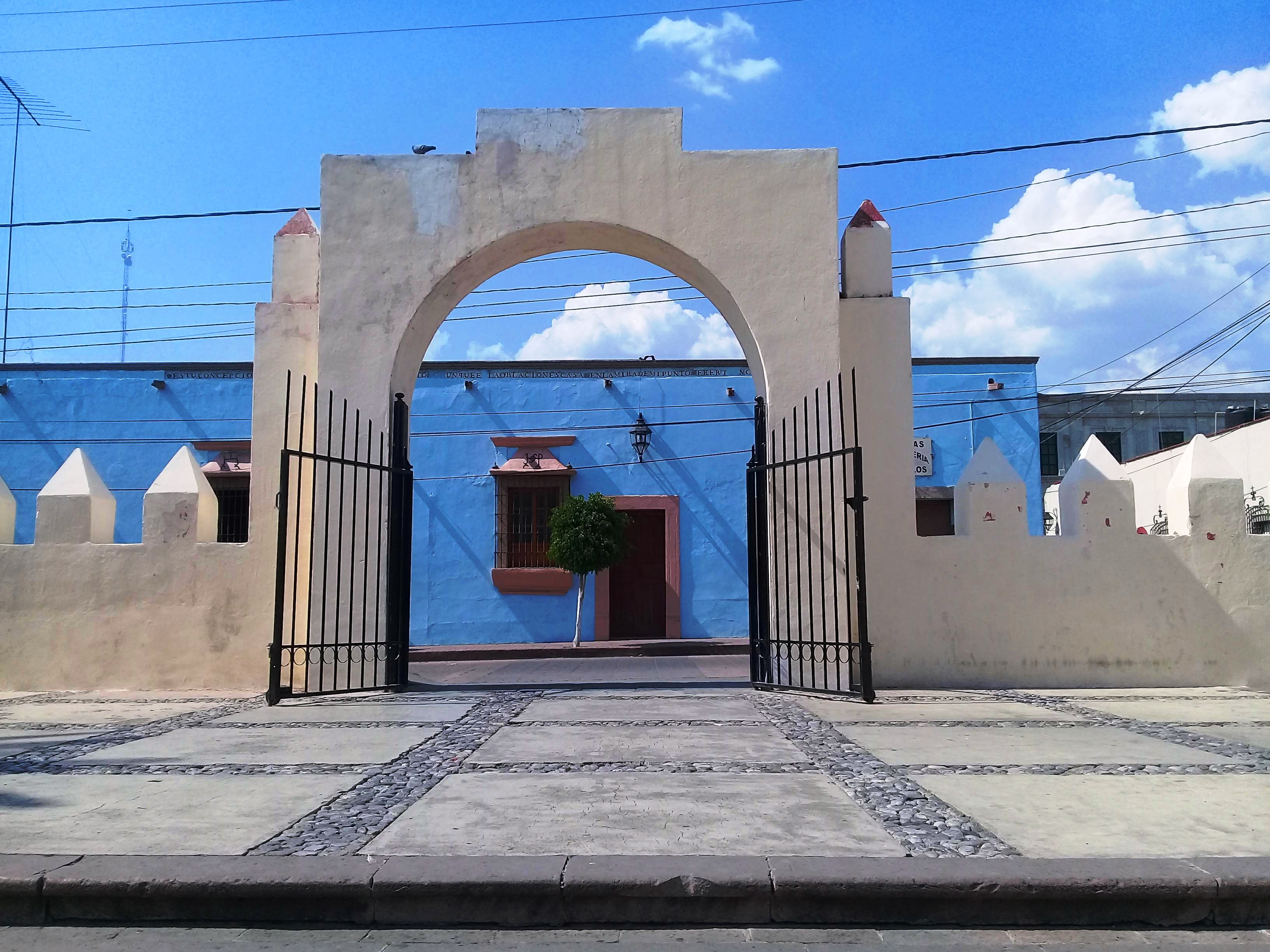 Templo y exconvento de San Nicolás de Tolentino en Actopan, Hidalgo, México.